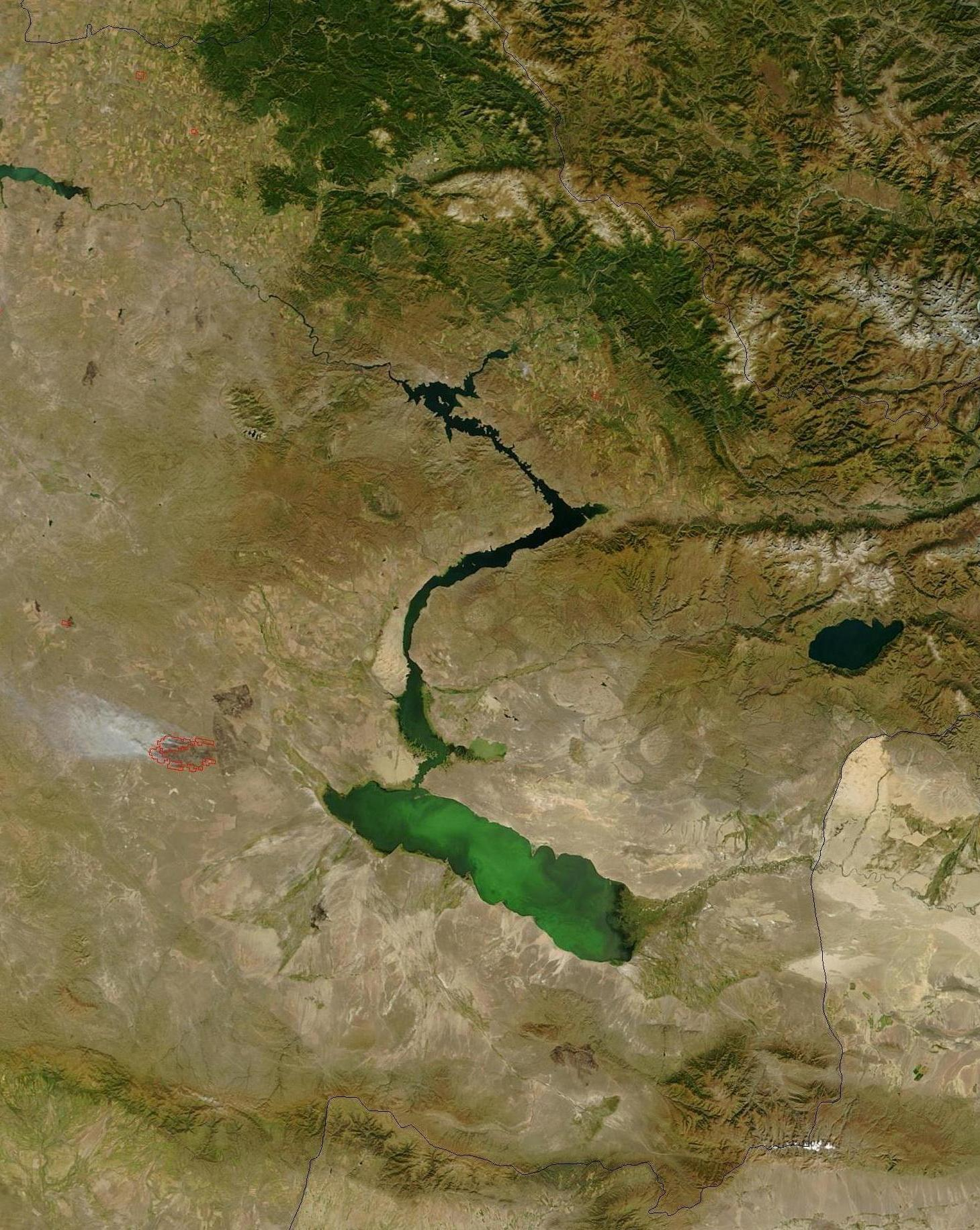 Озеро Зайсан